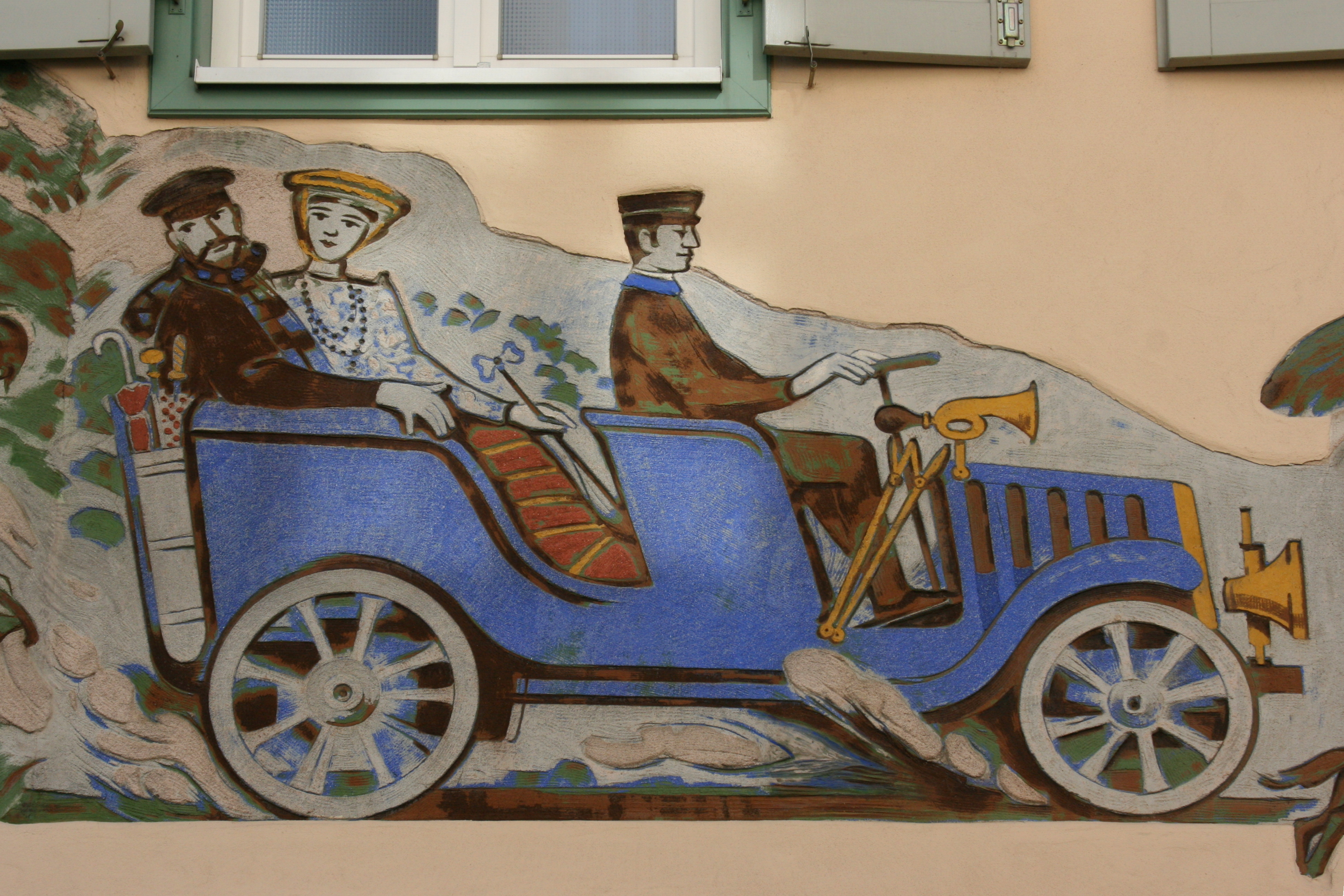 Haus Postplatz 2a in Heiligenberg